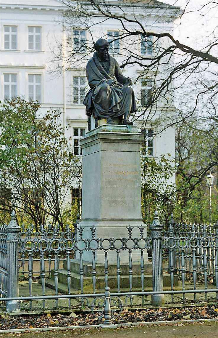 Bildbeschreibung: Hahnemanndenkmal in Leipzig Quelle: selbst fotographiert Fotograf/Zeichner: Benutzer:ALoK Datum: 2005-03-20 Sonstiges: Das Hahnemanndenkmal wurde am 10.08.1851 enthüllt.